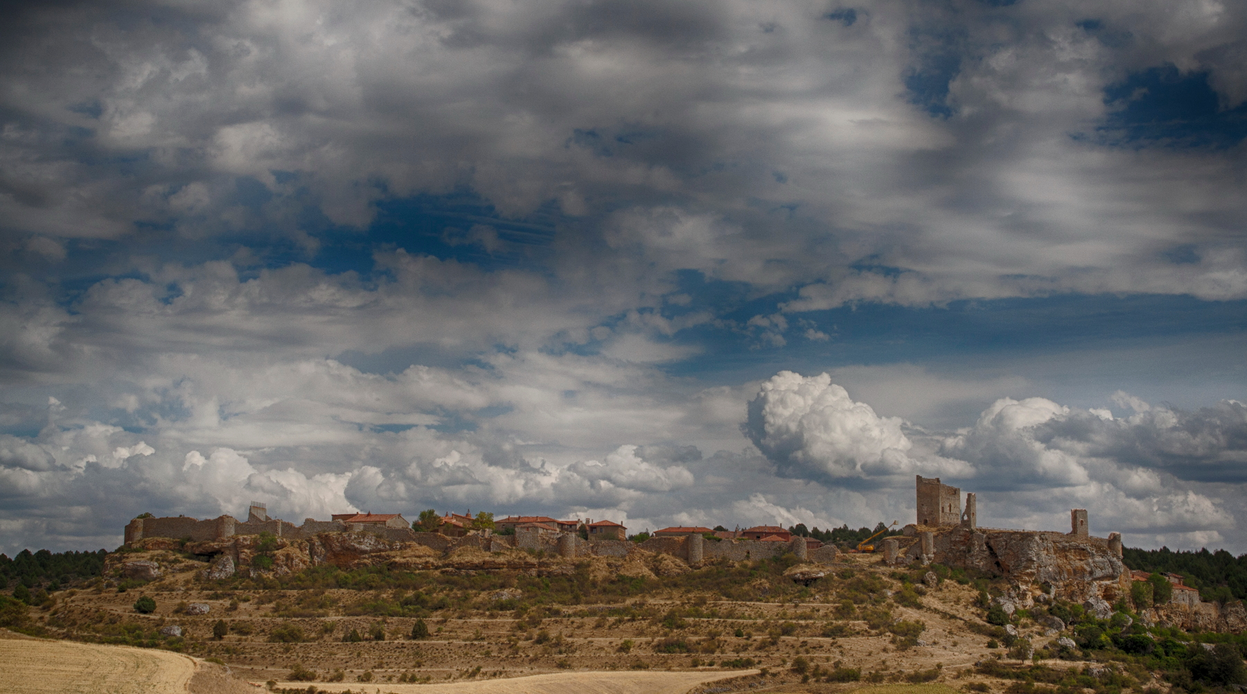 Calatañazor Provincia de Soria Castilla y León España